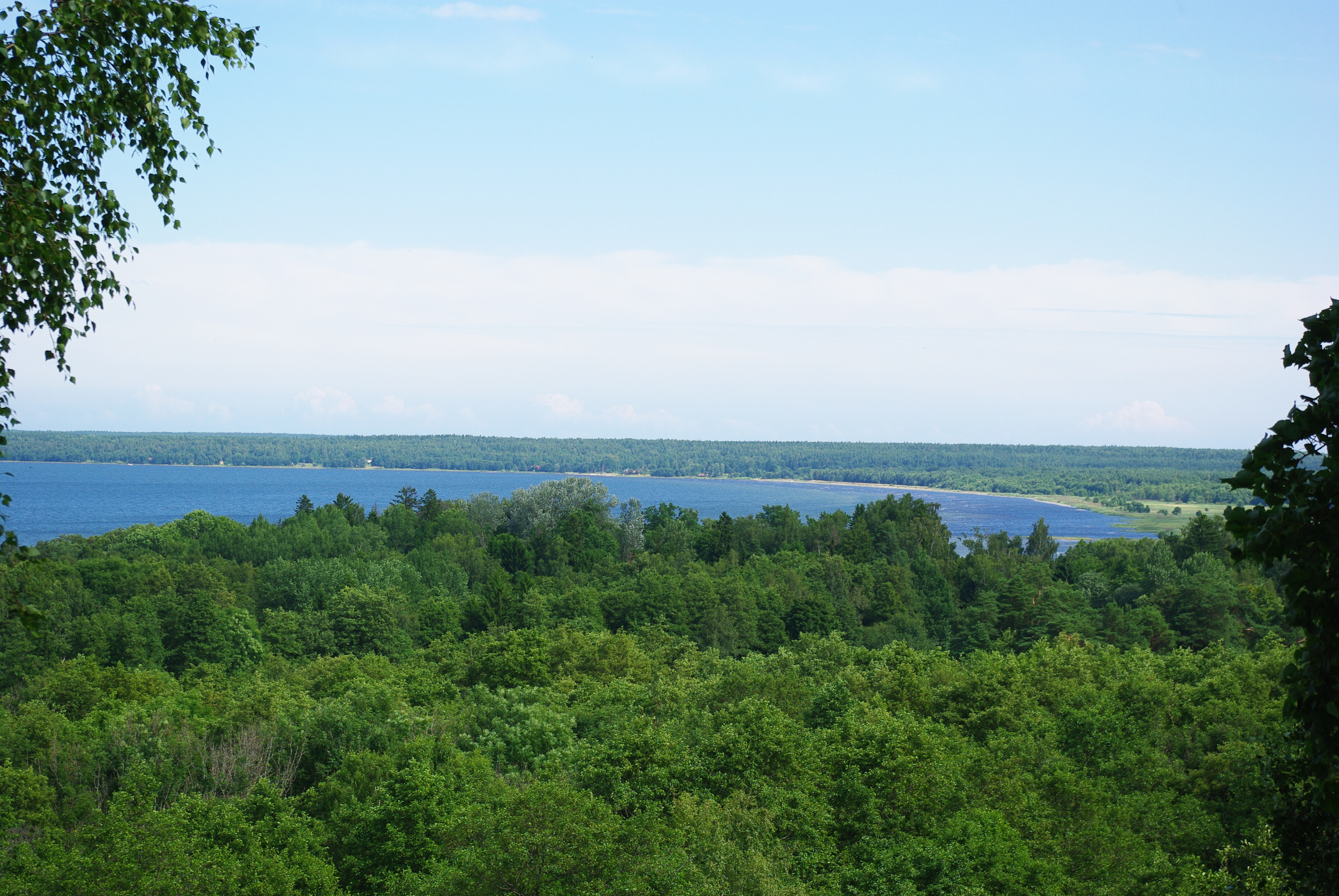 Vaade linnamäelt Kolga lahele